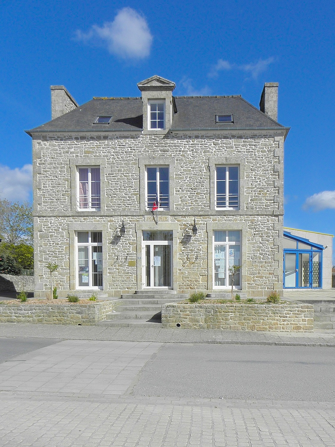 Mairie de Languédias (22).